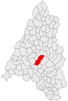 Categorie:Hărţi ale judeţului Bihor